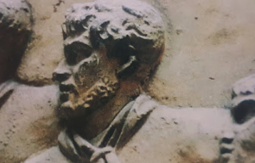 tie